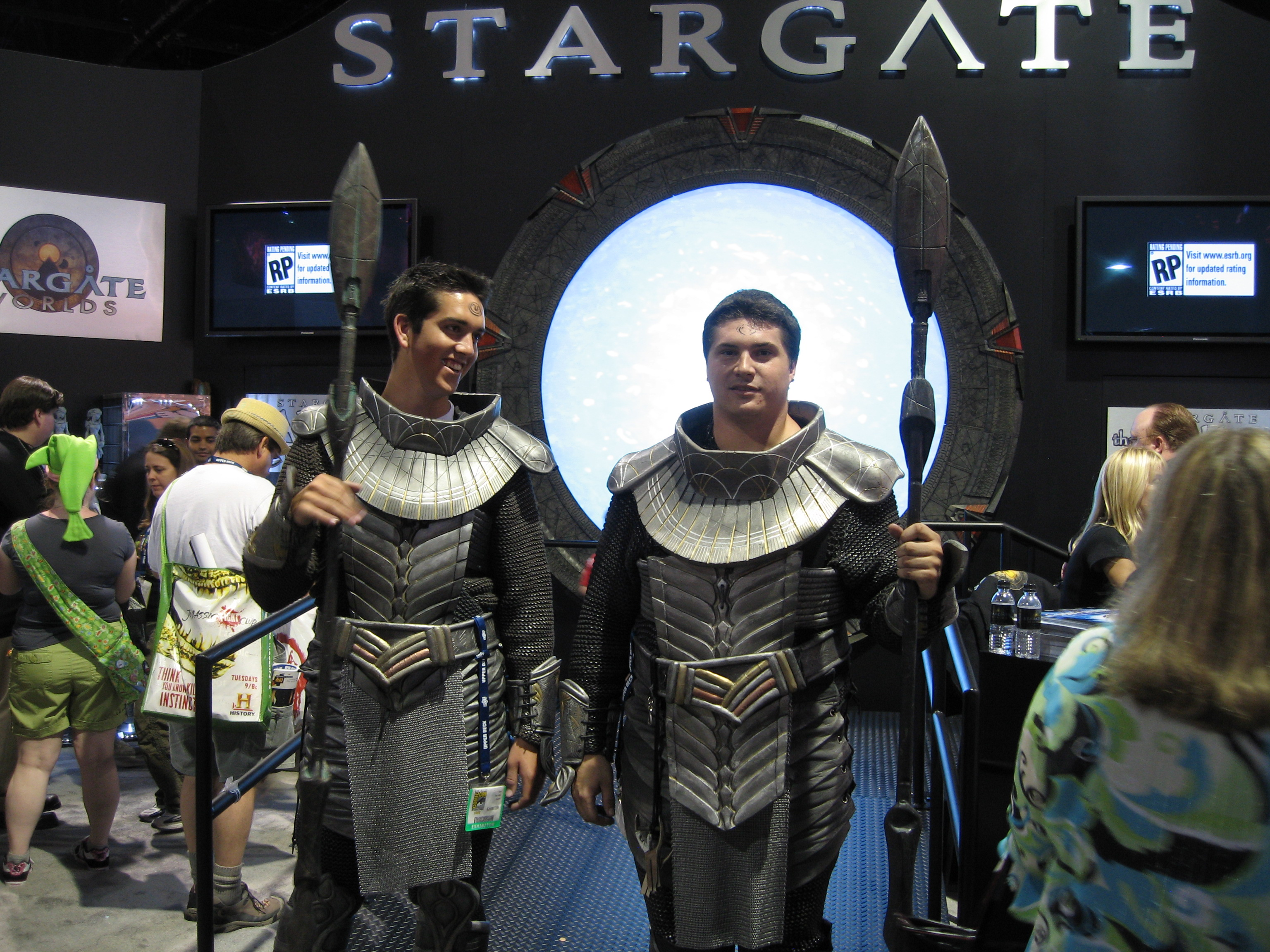 Costumes jaffas au Comic Con en 2008